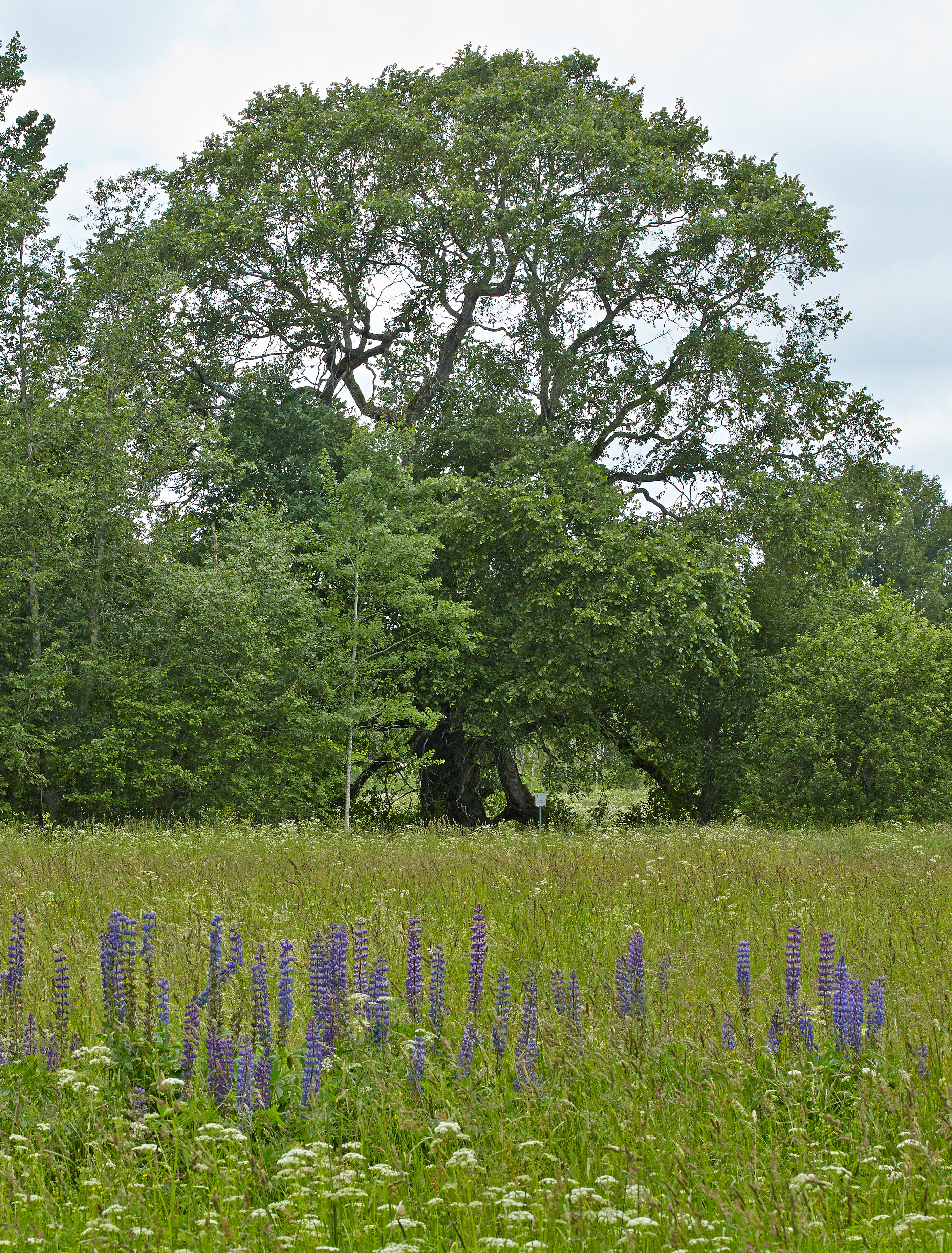 Saarniite jalakas